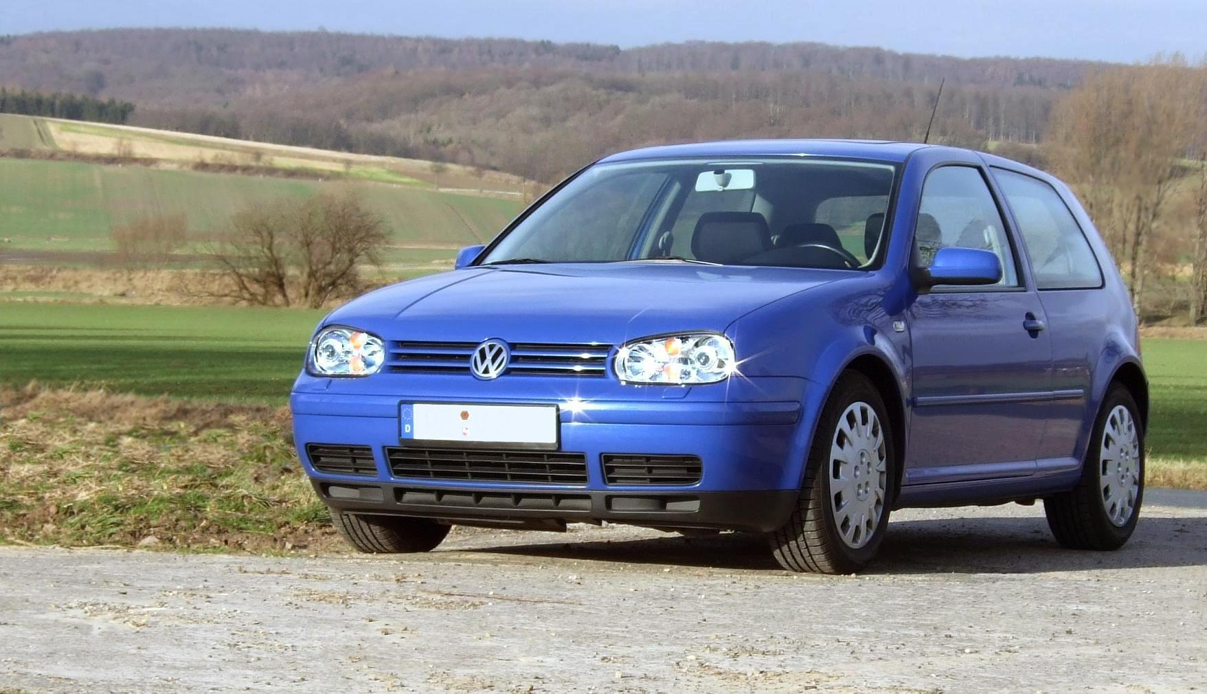 Volkswagen Golf IV V6 4Motion BJ 2001, 150kW